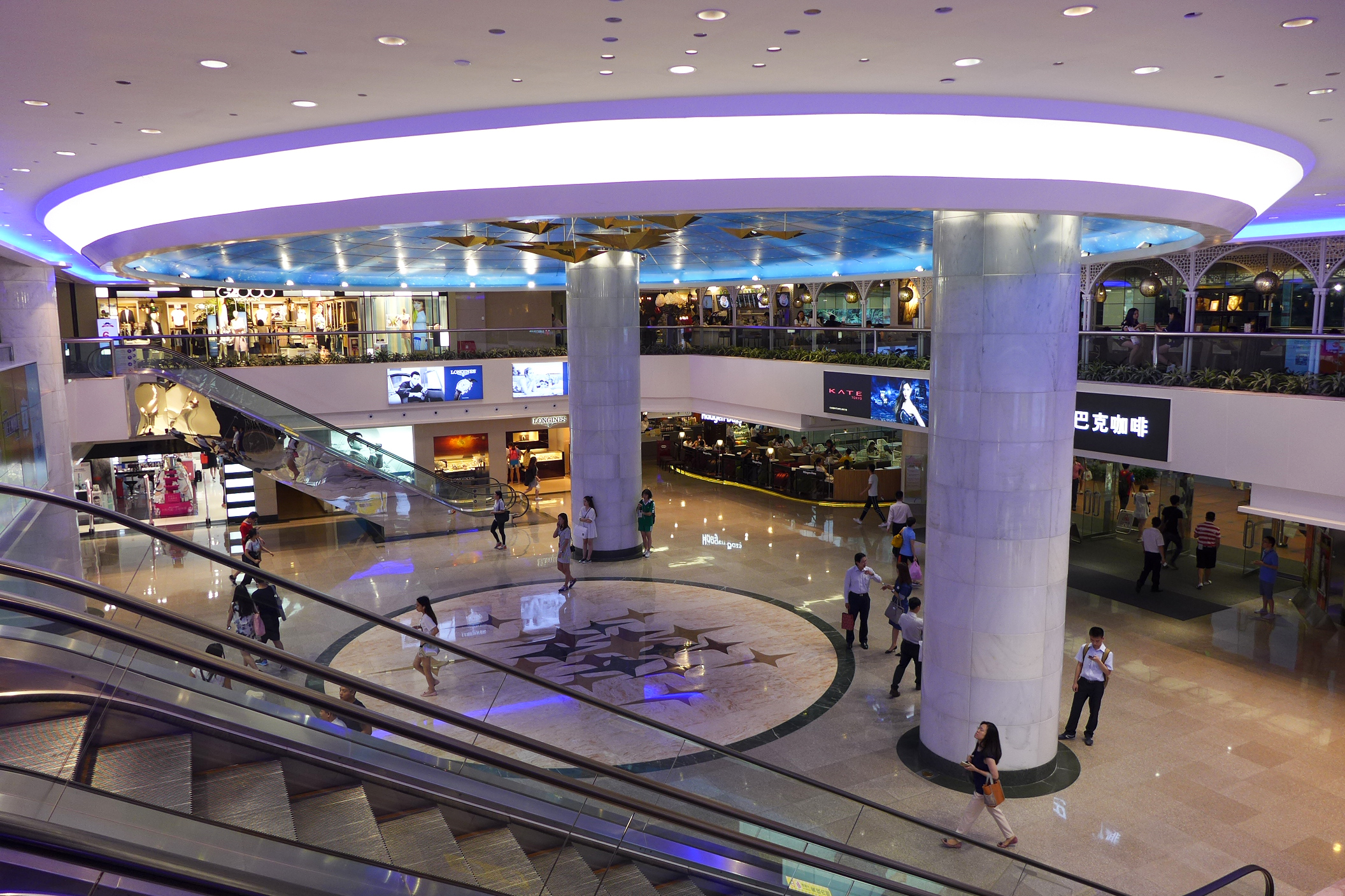 Teemall Entrance Void